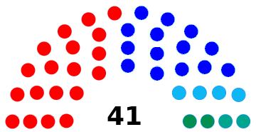 El PSOE posee 19 vocales, el PP 14, PMP 4, IU 2 y GIPMTM 2.